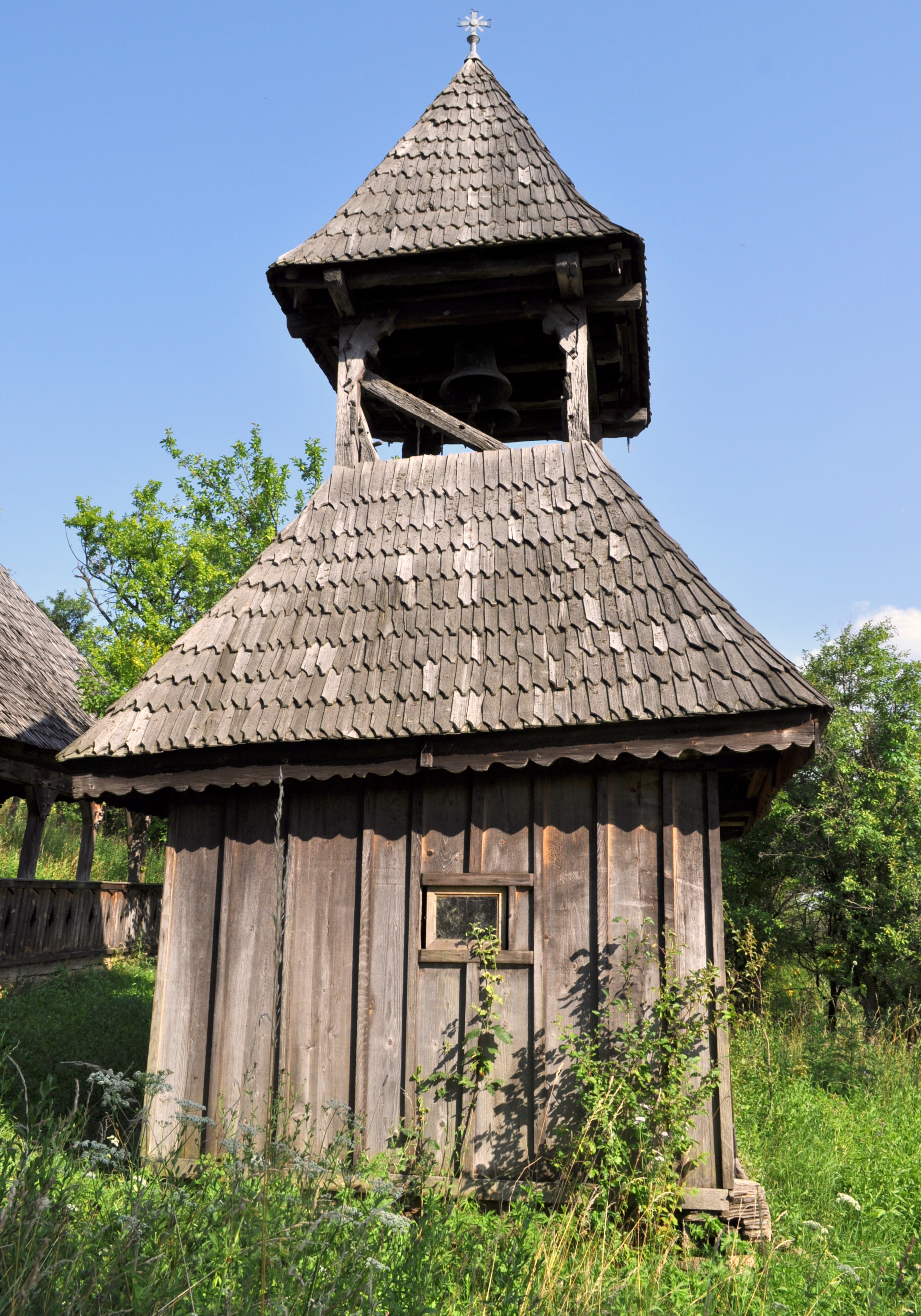 Biserica de lemn „Sfinții Arhangheli” din Băița, Mureș